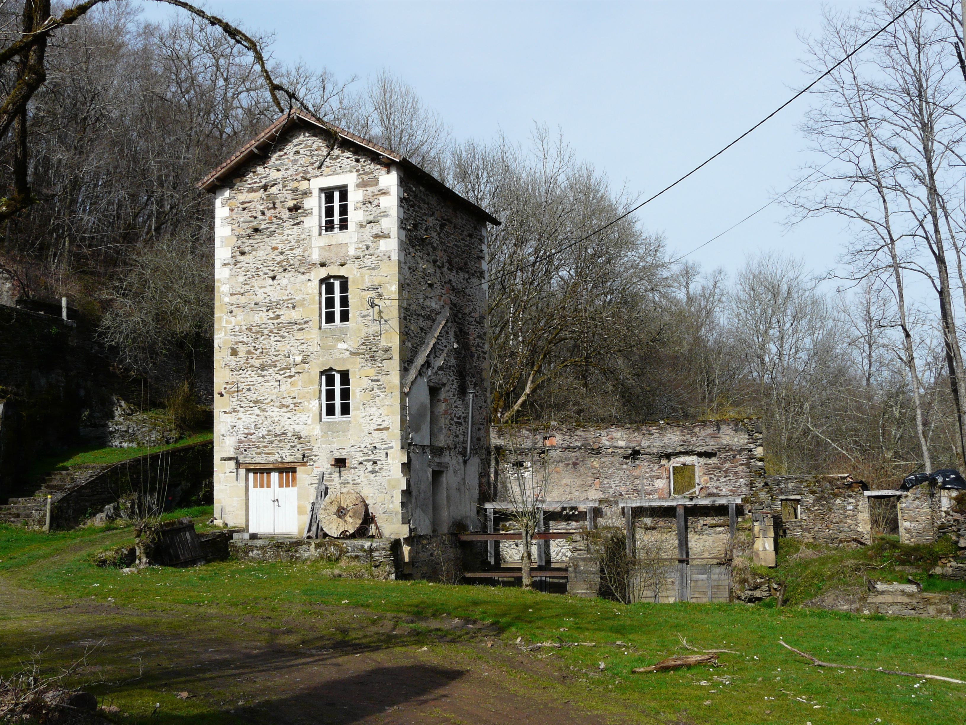 Les ruines de l'ancien moulin de Guimalet, Anlhiac, Dordogne, France